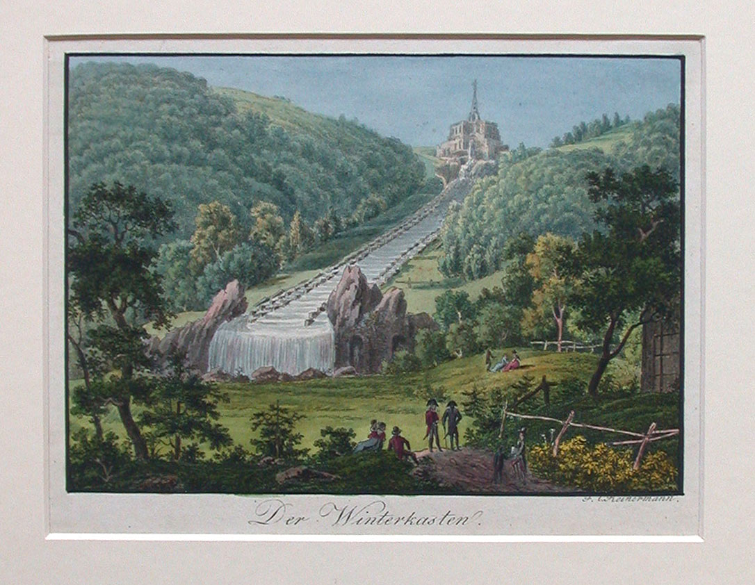 Herkules und Kaskaden in Kassel